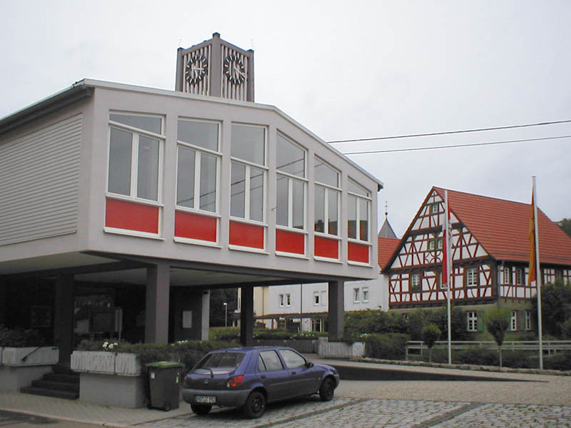 Rathaus von Zuzenhausen, erbaut 1967